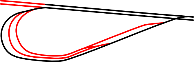 Schemat pętli Motoarena